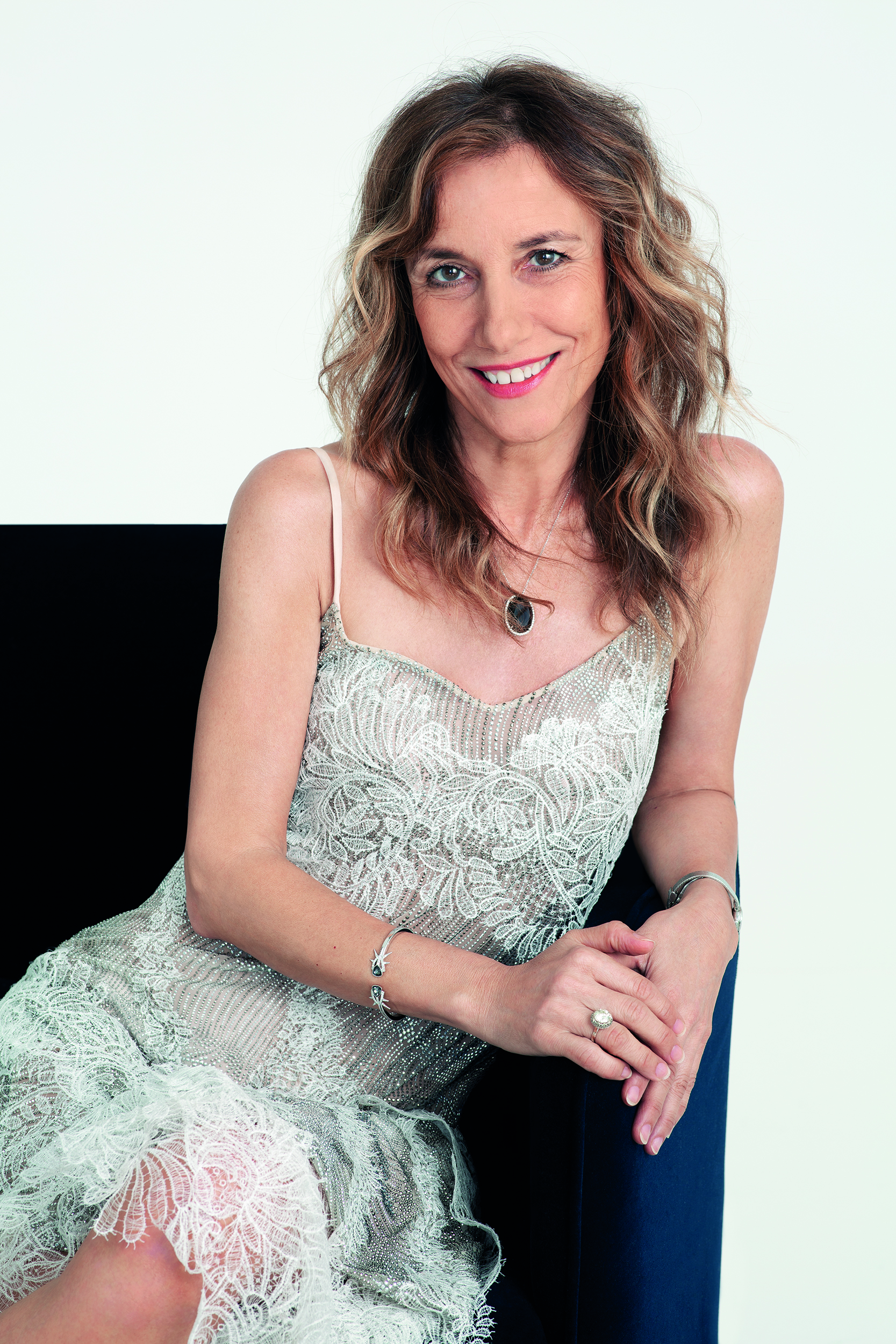 Silvia Grilli, direttore della rivista Grazia (Mondadori).